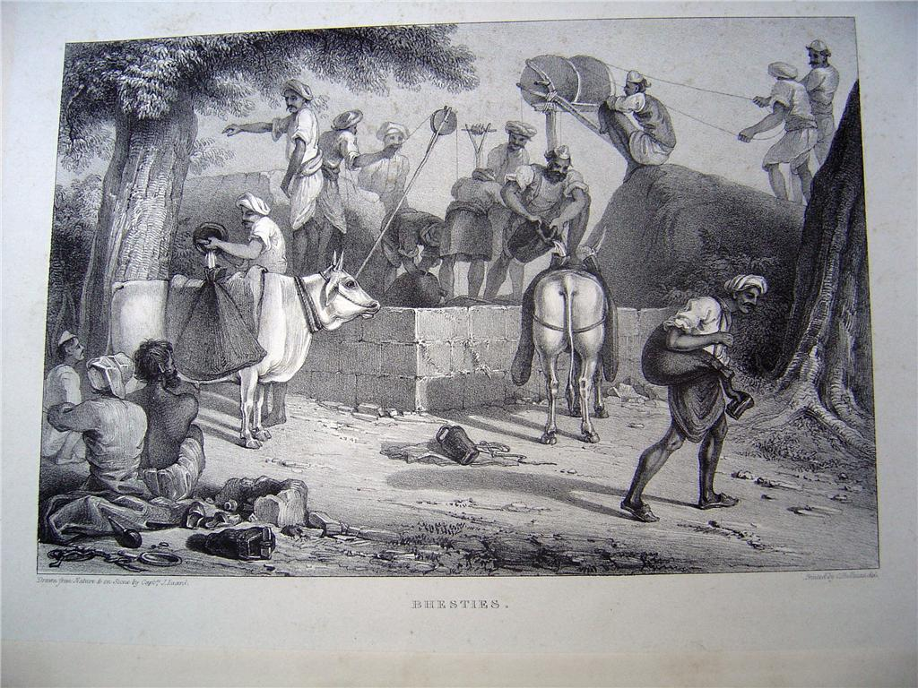 Bhesties